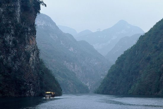 Template:小三峡